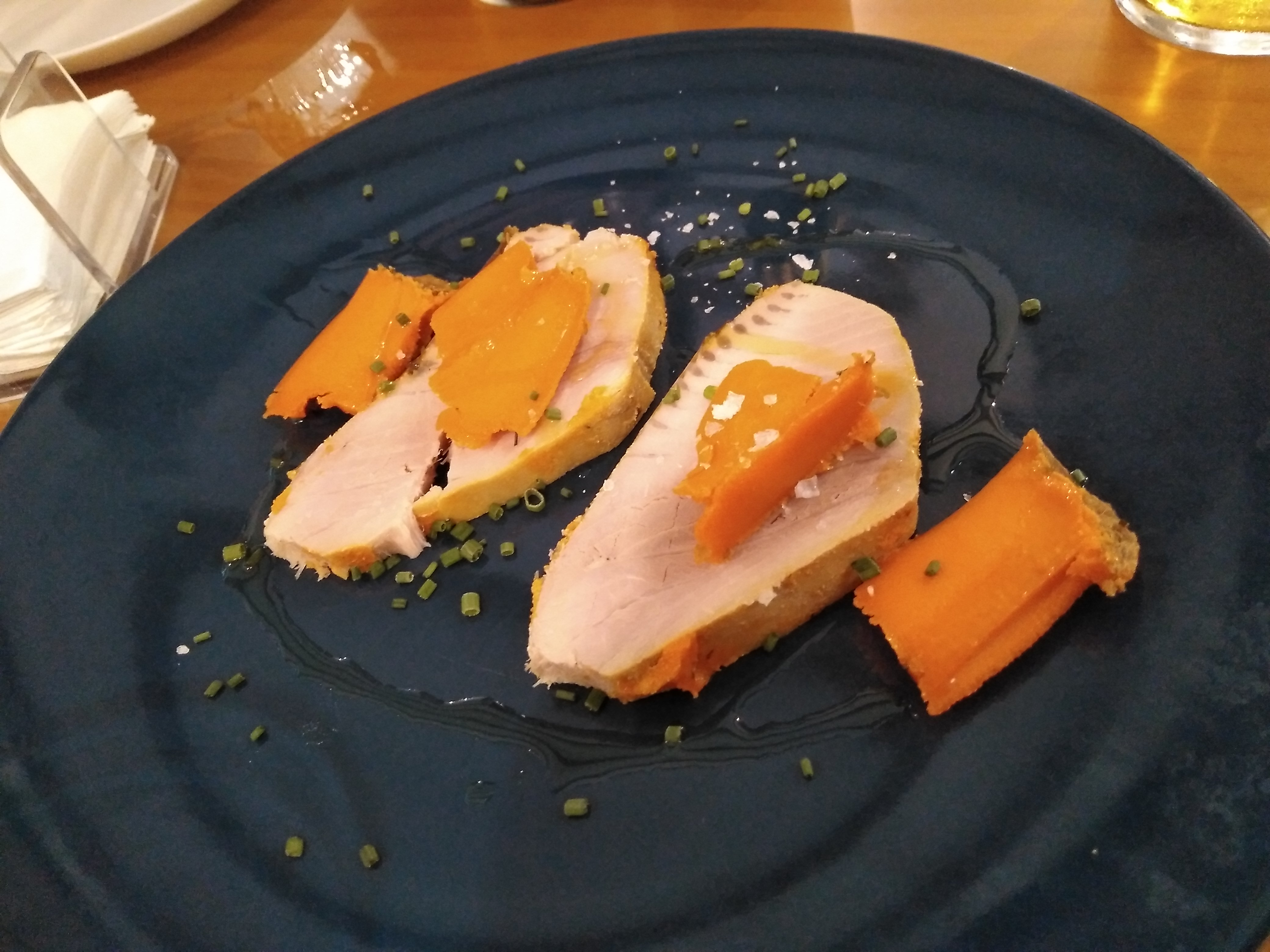 lomo de atún con manteca colorá